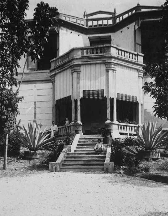 Foto. Het huis van houtvester J.R. Beversluis in Telawah